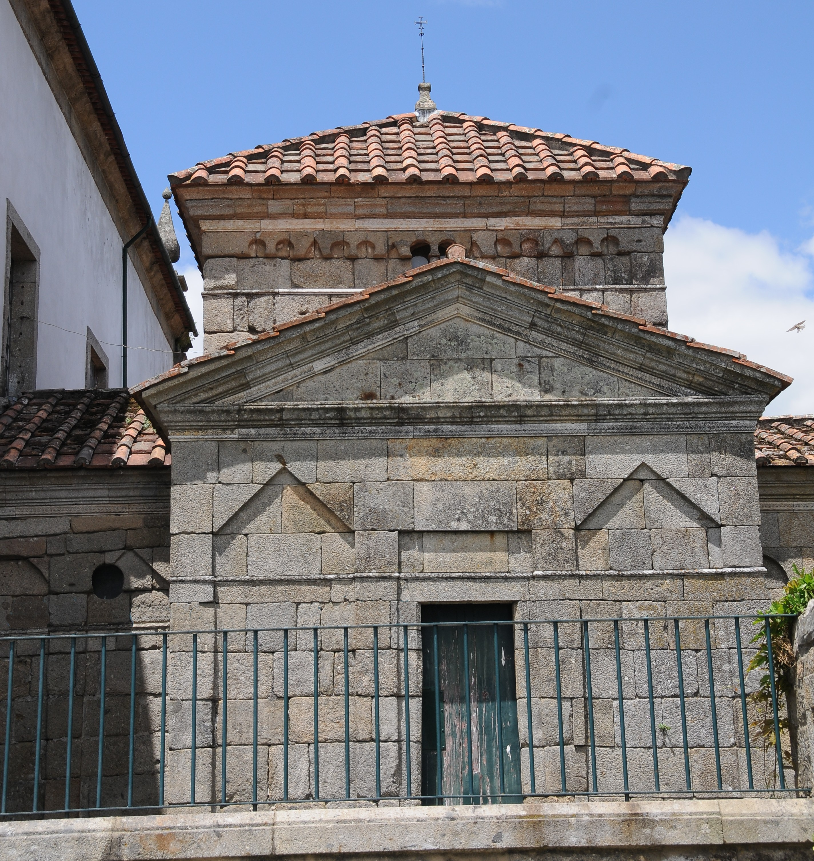 Saint Frutuoso Chapel in Braga Portugal